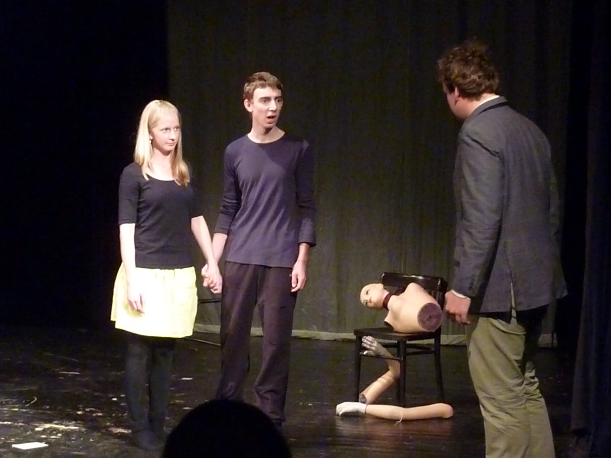 Adaptace překladu dramatu R. U. R. Karla Čapka do esperanta v podání divadla DOMA ze Svitav během dětského festivalu cizojazyčných divadel Festivadlo v Brně 23.03.2013.